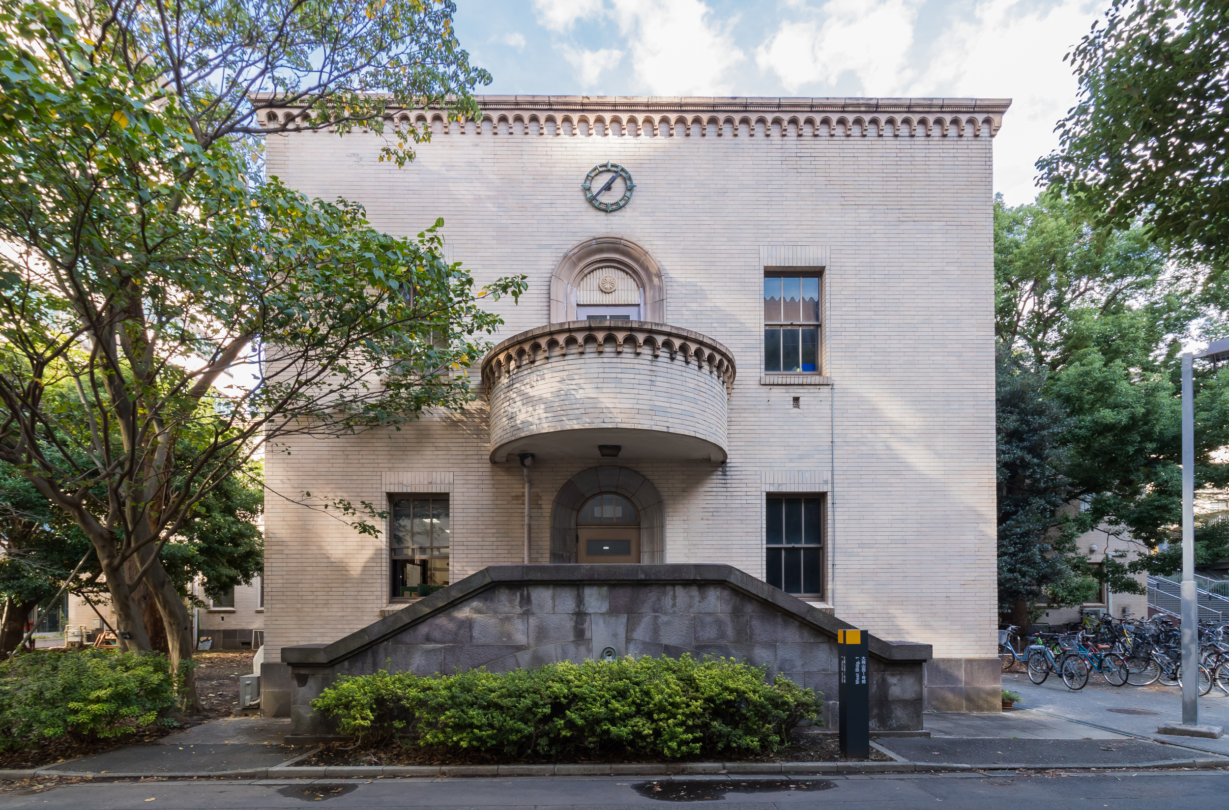 東京工業大学 大岡山キャンパス西1号館（旧・分析化学教室） 西側。東京工業大学復興部設計（1931）、国登録有形文化財。